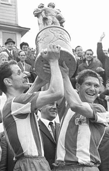 Factual corrections and alternative descriptions are encouraged separately from the original description. Additionally errors can be reported at this page to inform the Bundesarchiv. Original historic description: FDGB-Pokal, Finale, 1 FC Union Berlin - FC Carl Zeiss Jena 2:1 Halle: 17. FDGB-Pokalfinale im Fußball 1. FC Union Berlin gegen FC Carl Zeiss Jena 2:1 am 9.6.1968 Union-Kapitän Ulrich Prüfke (Mitte) und Ralph Quest halten die schwere Bronzestatue ihren Anhängern entgegen. Links: Verteidiger Wolfgang Wruck. [Halle.- Spieler des 1. FC Union Berlin mit dem FDGB-Pokal, jubelnd] Abgebildete Personen: * Wruck, Wolfgang: Fußballspieler, 1. FC Union Berlin, DDR